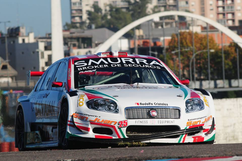 Segunda generación del prototipo de carreras Fiat Linea, para la categoría argentina de automovilismo de velocidad Top Race.